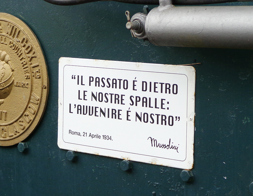 Targhe fasciste esposte al Museo dei trasporti Ogliari di Ranco